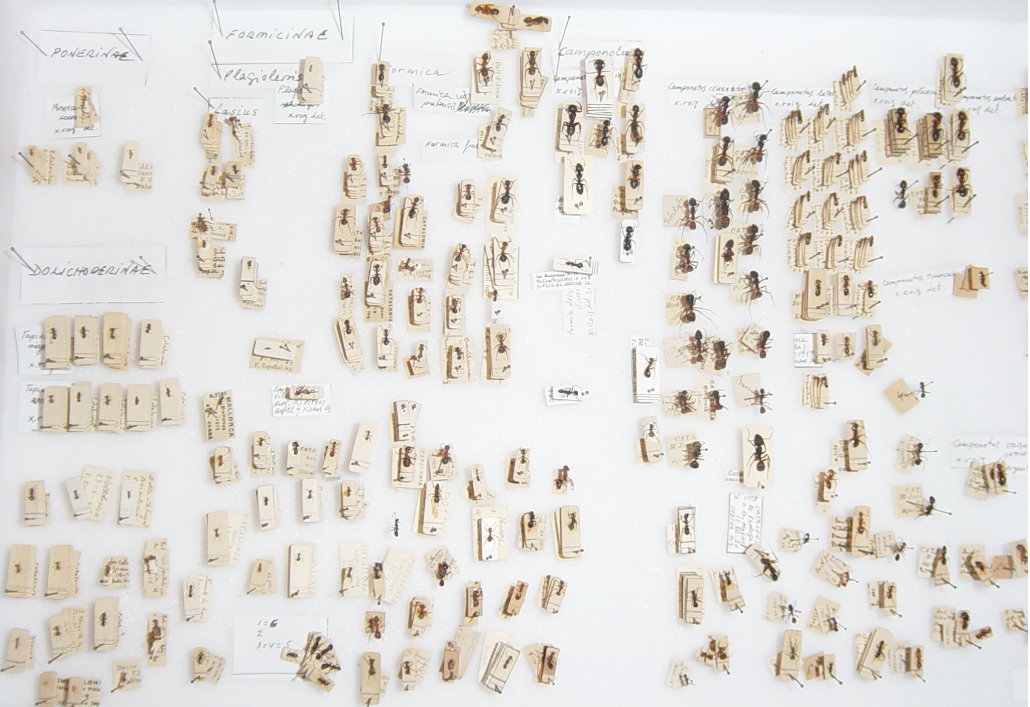 capsa entomològica de formigues durant la tasca de classificació